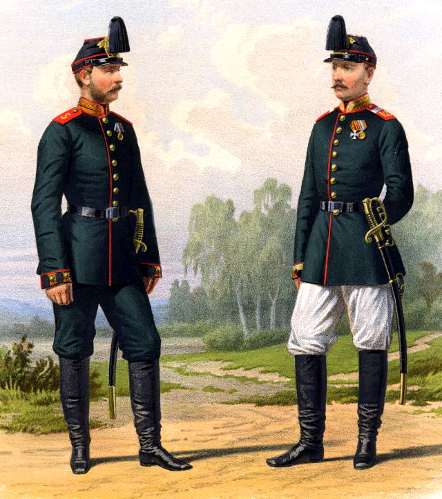 Kanonier (links) 1. Battarie 5. Artilleriebrigade und Feuerwerker (rechts) 1. Battarie 12. Artilleriebrigade (Paradeuniform) 17. April 1878.